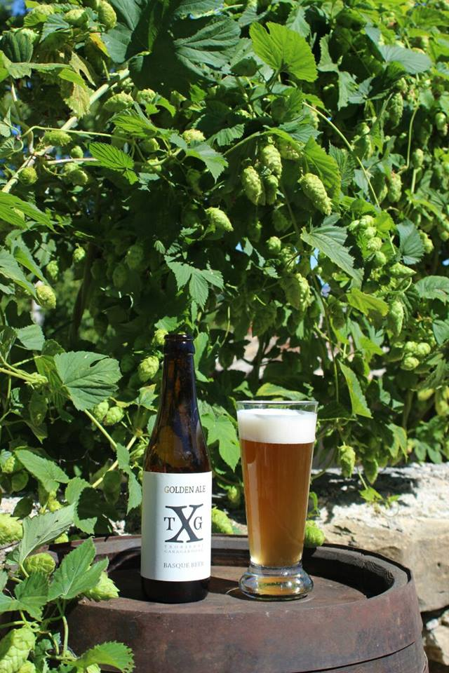 Txorierri Garagardoak enpresaren produktuetako bat: Golden Ale garagardoa.